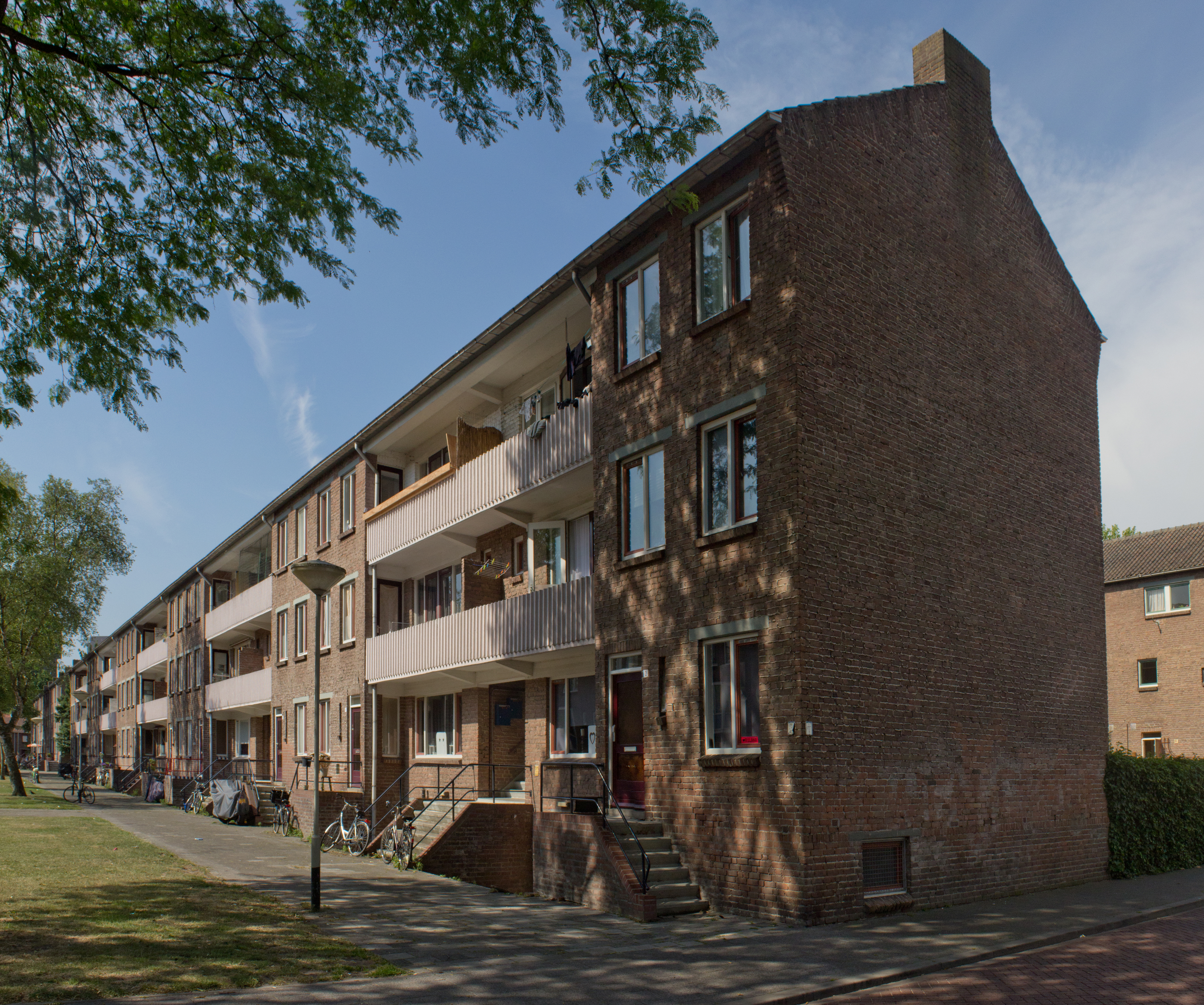 Zicht op woningen in een deel van de Hudsonstraat in de wijk de Heuvel (Breda) in Breda. Ontworpen door Frits Peutz